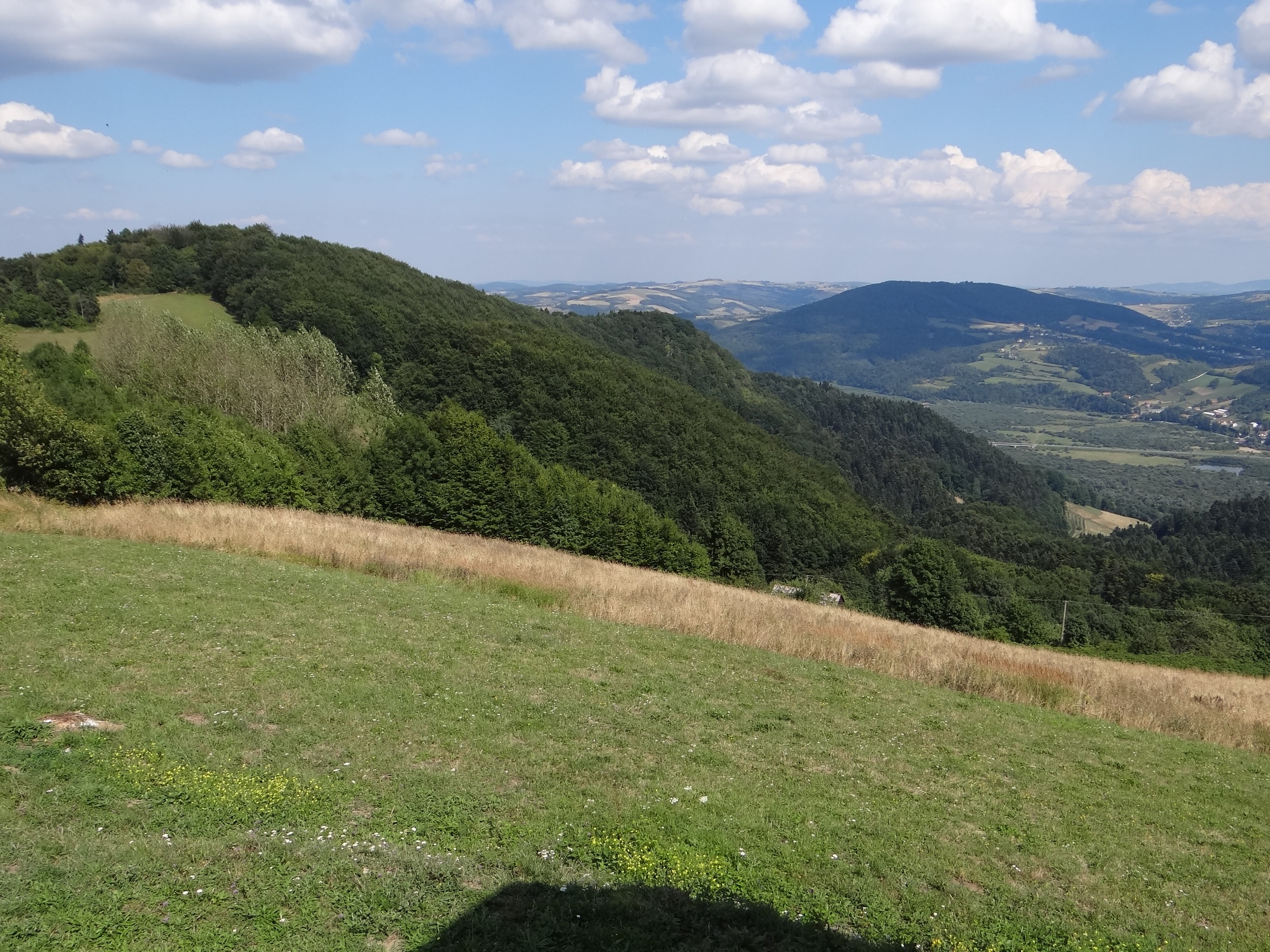 Białowodzka Góra. Widok spod nowej kaplicy na Pogórze Roznowskie i szczyt Białowodzkiej Góry